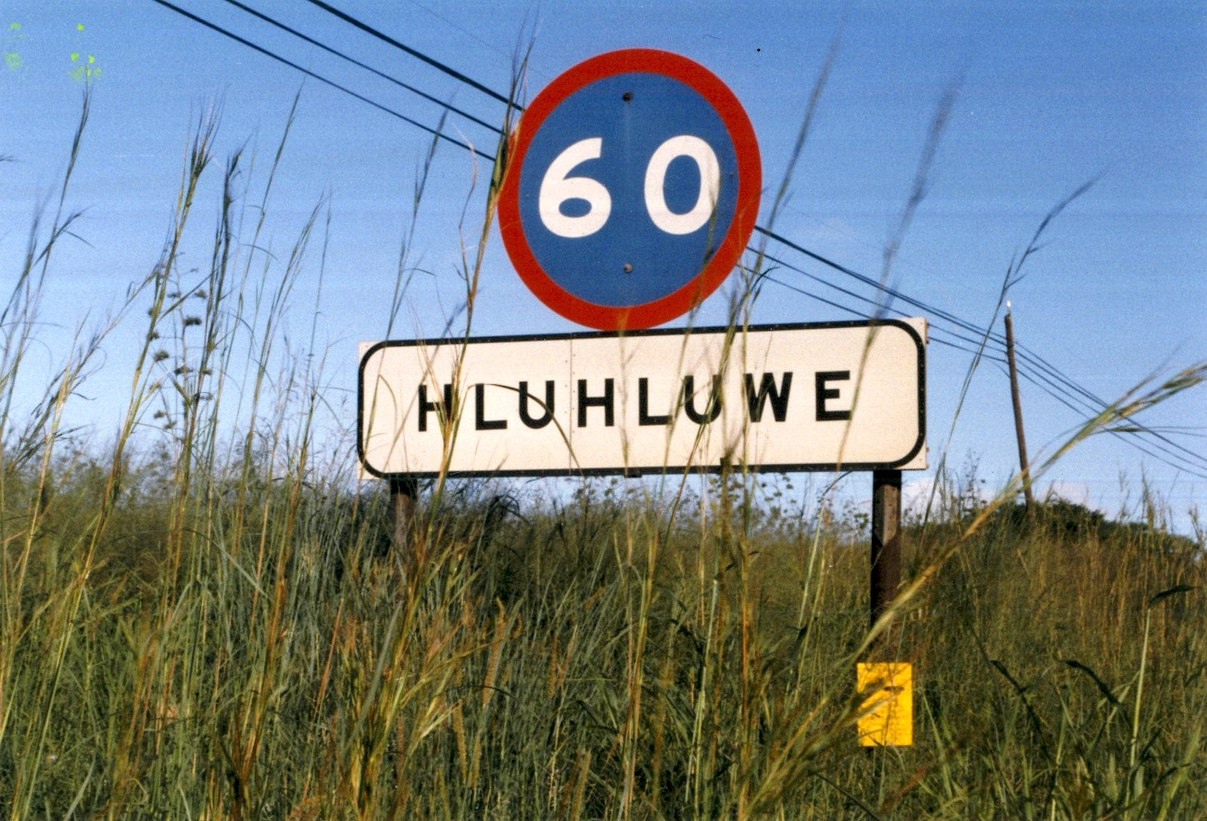 Hluhluwe Street Sign